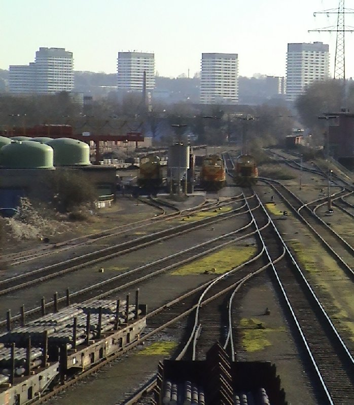 Mülheim an der Ruhr: Industriebahnverkehr in Mülheim. Im Hintergrund die vier Hochhäuser in der Innenstadt.